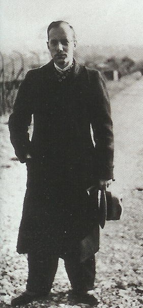 Hans Dietrich ERNST, Commandeur de la police S.S. à ANGERS pendant l'occupation